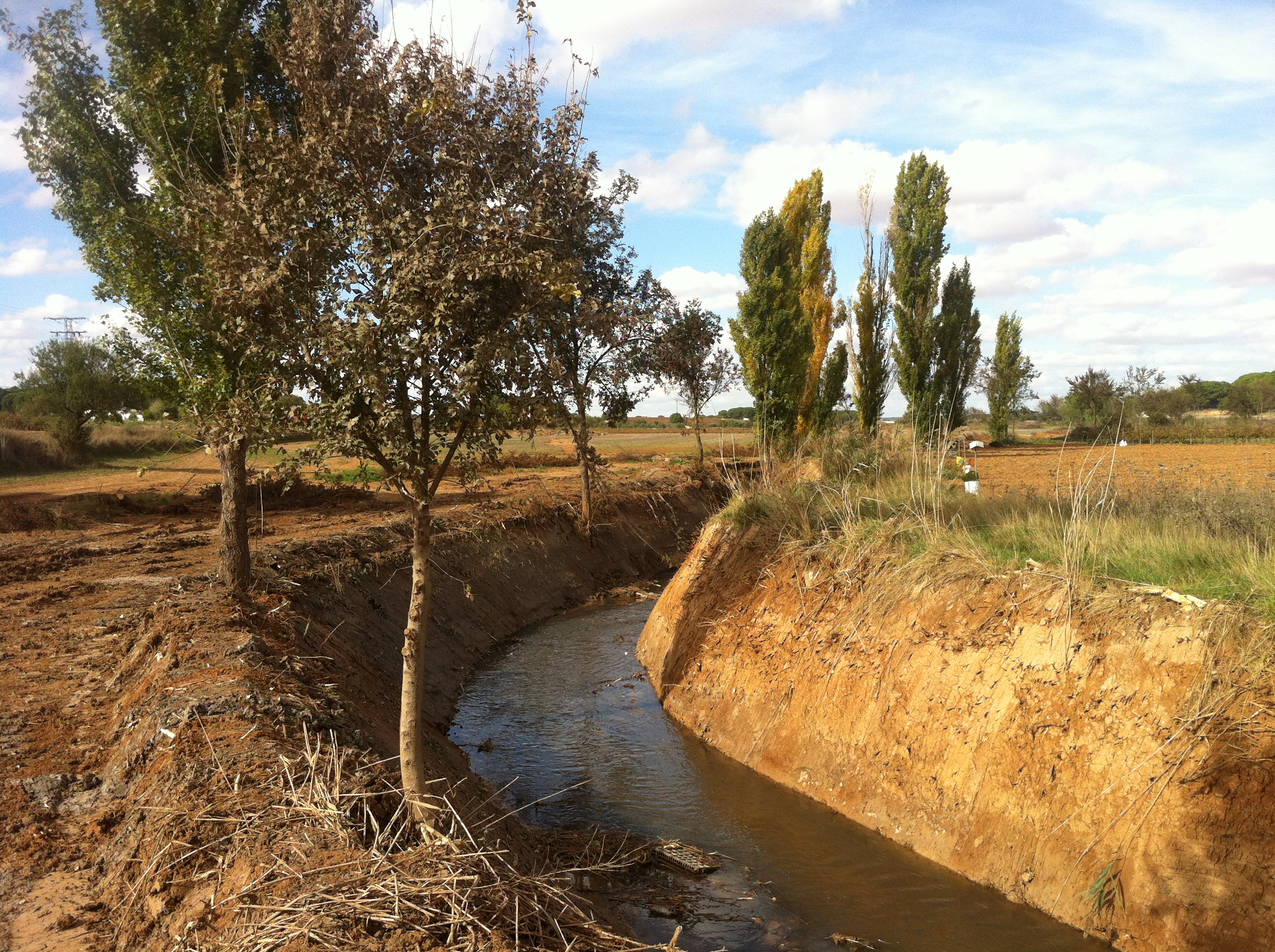 Imagen del río Valdemembra